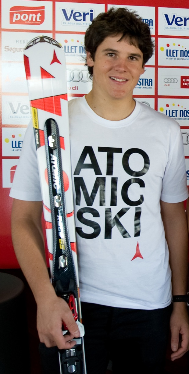 Kevin Esteve